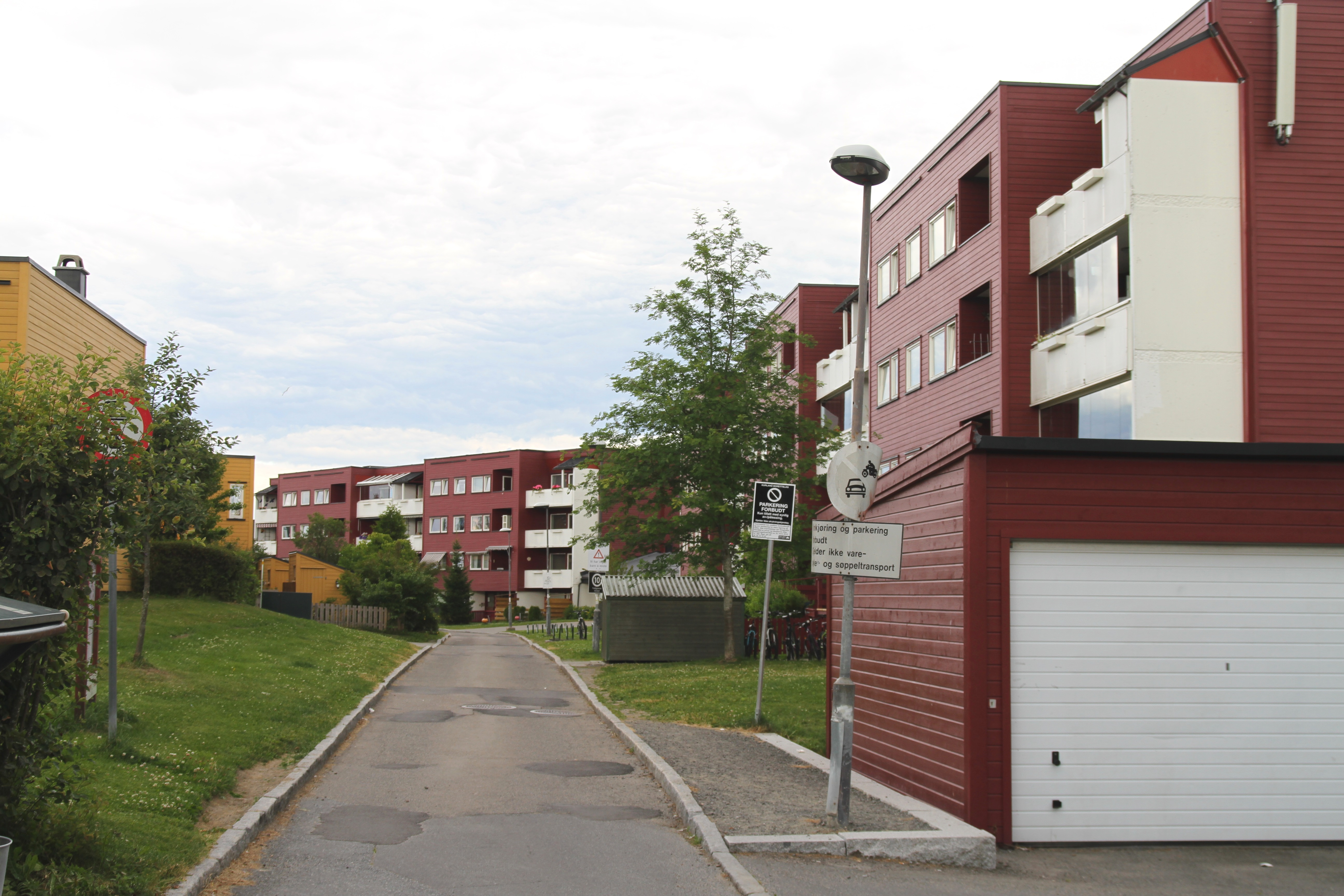 Kurlandstien i Oslo.